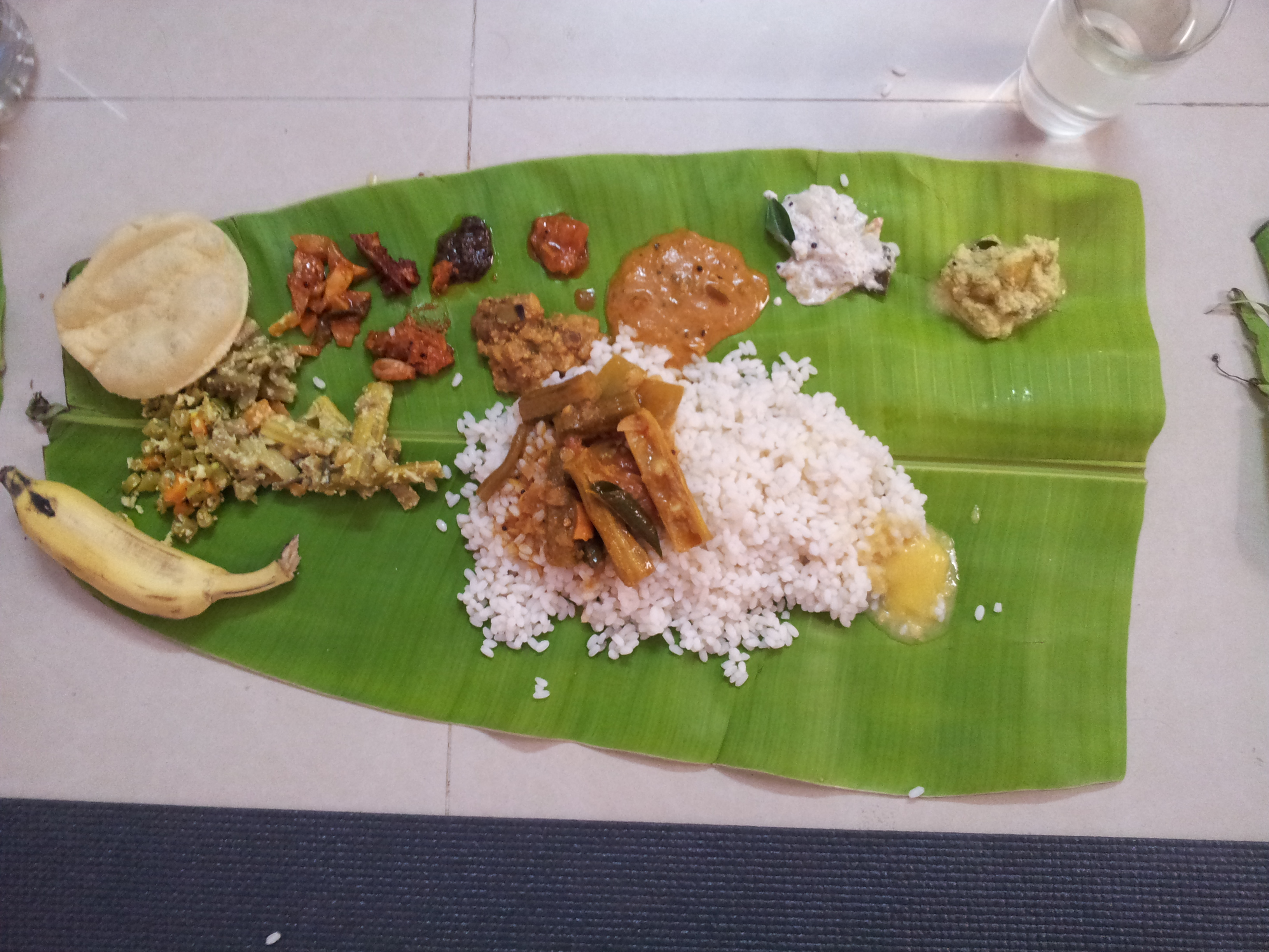 Kerala Sadya during Vishu